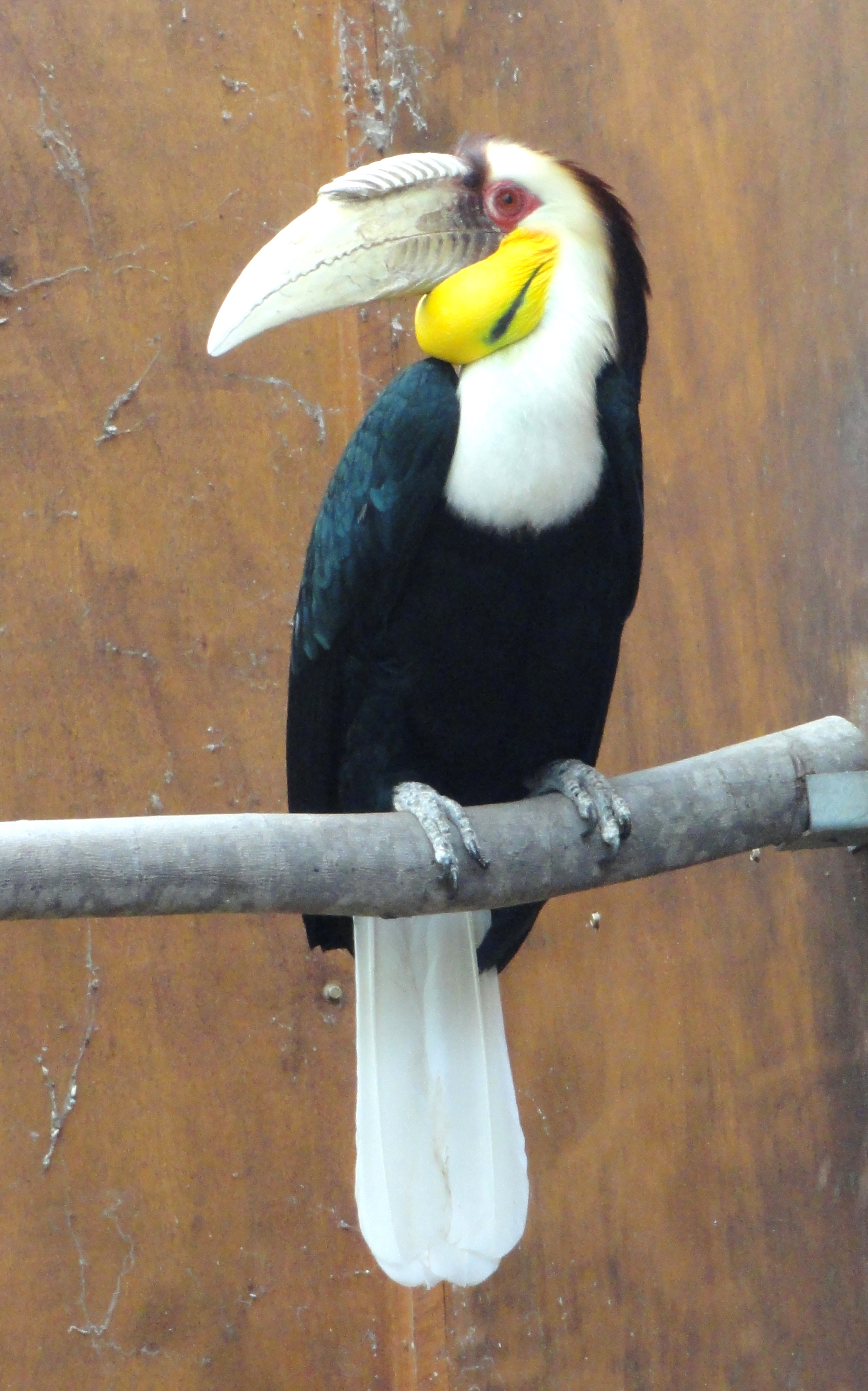 Rhyticeros undulatus male exhibited in the Jardin d'oiseaux tropicaux, La Londe-les-Maures, France.